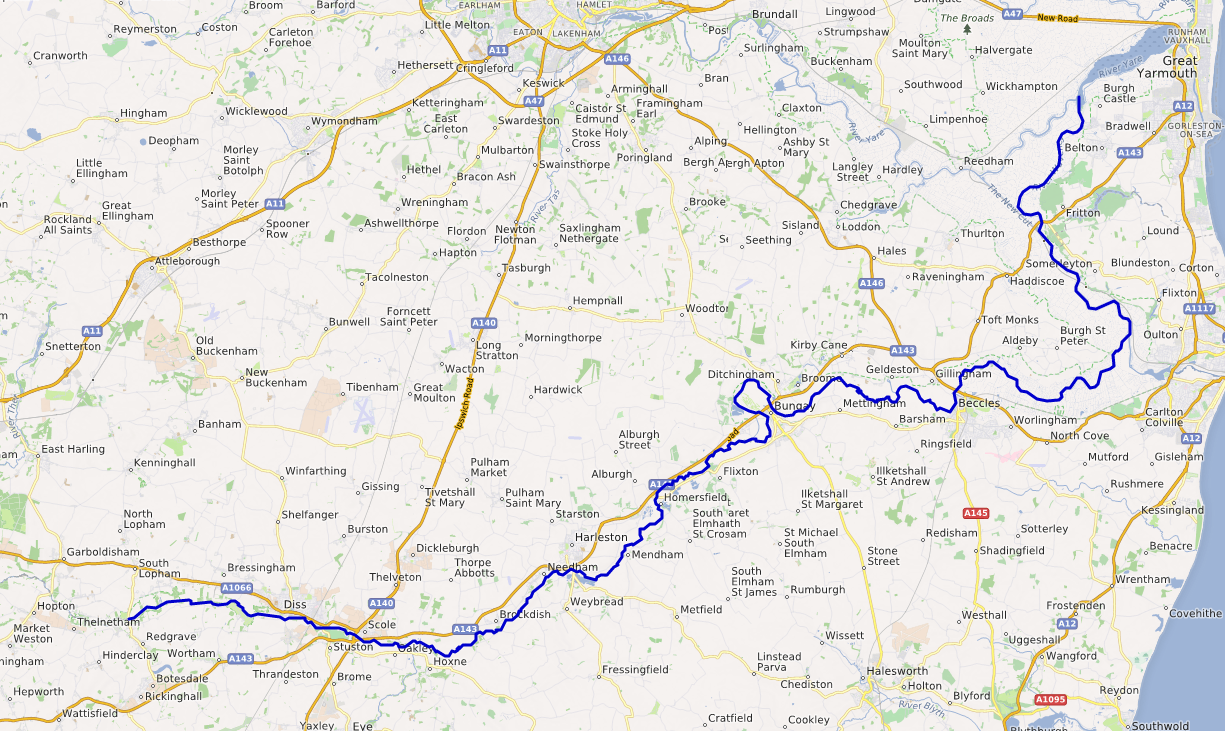 carte réalisée sur umap This map may be incomplete, and may contain errors. Don't rely solely on it for navigation.